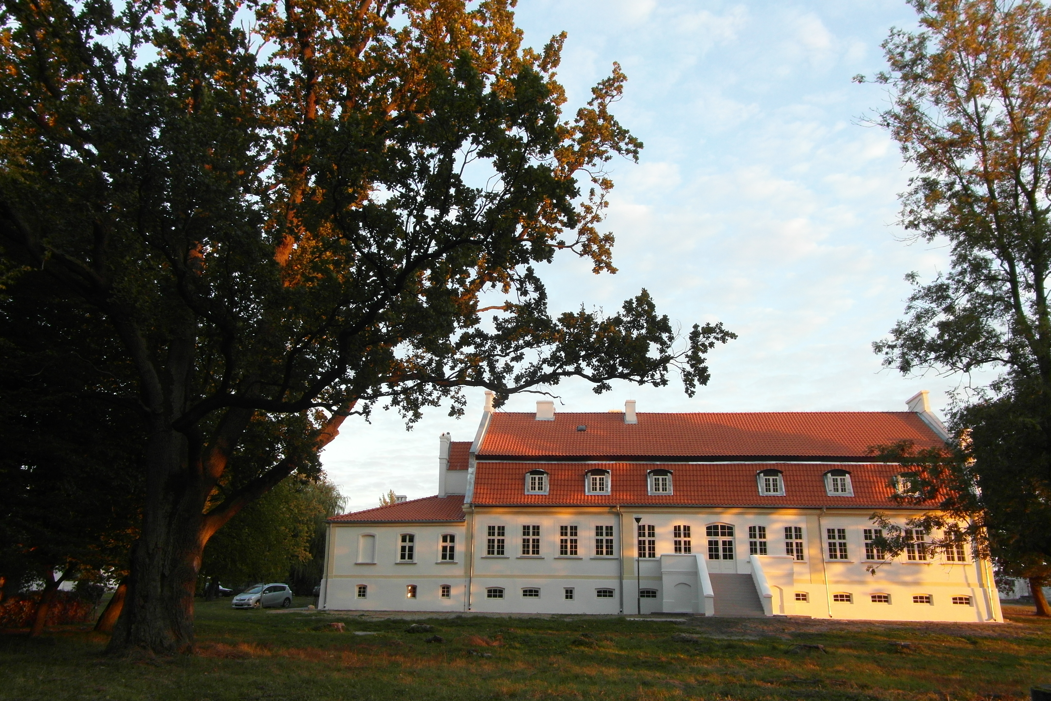 Czernin (gmina Sztum) - zespół dworsko-parkowy (dwór, park)